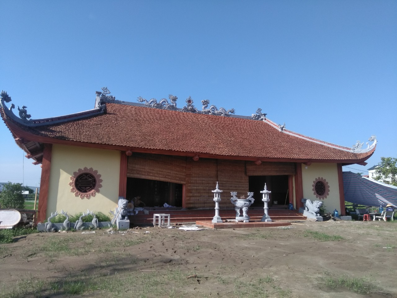 Đình Thịnh Liên, Trung Mầu (Gia Lâm, Hà Nội) thờ 3 vị tướng thời Đinh: Cao Chương, Cao Gia, Tòng Chinh có công đánh dẹp loạn 12 sứ quân và giặc Chiêm Thành